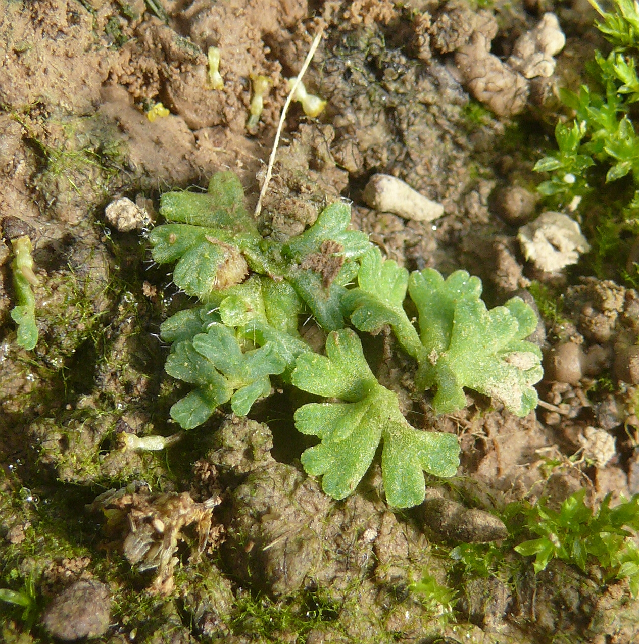 Riccia ciliata, R. sorocarpa, R. glauca Hohenlohe, Deutschland